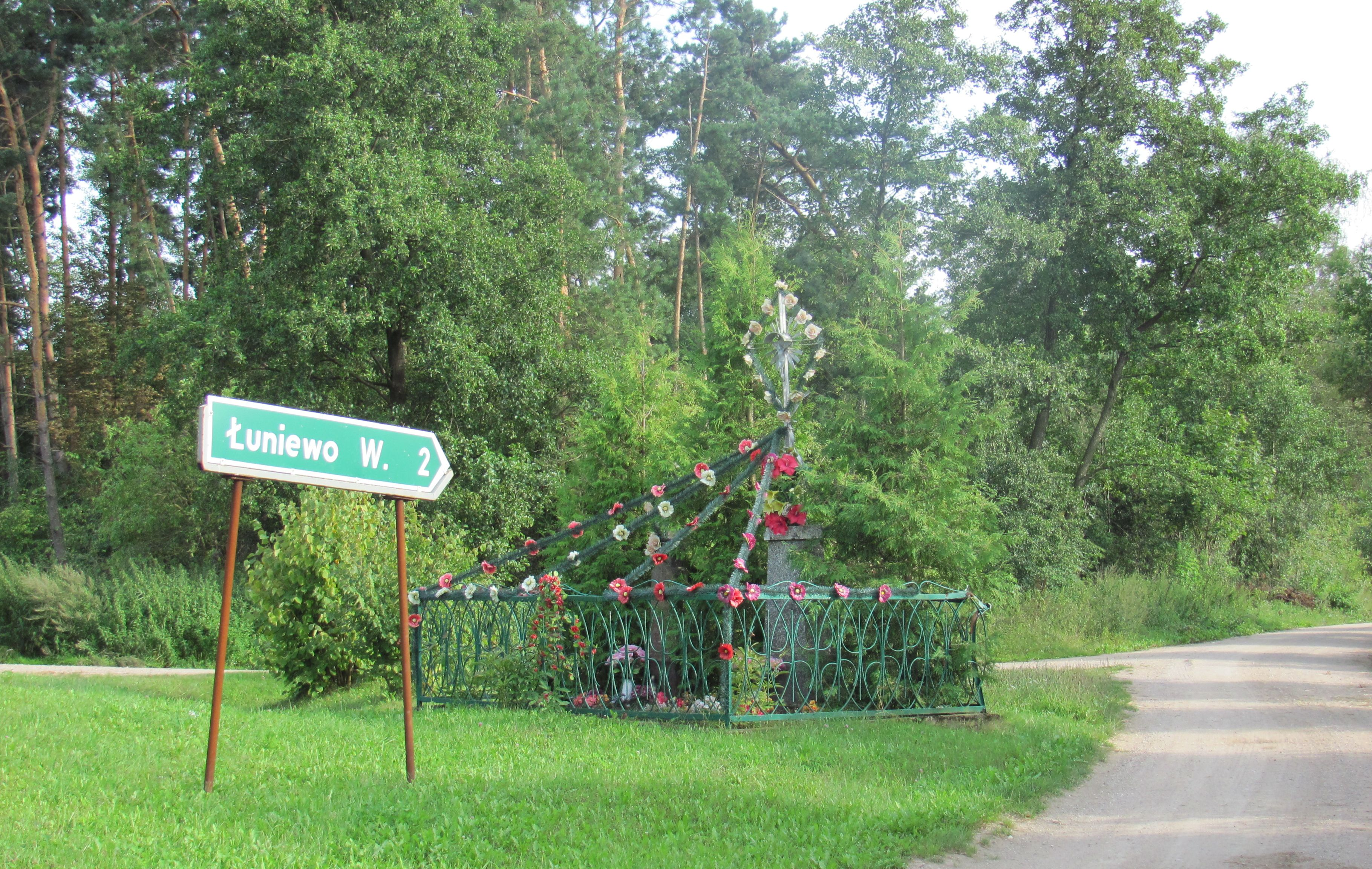 Kapłań - przydrożny krzyż na rozstaju dróg.